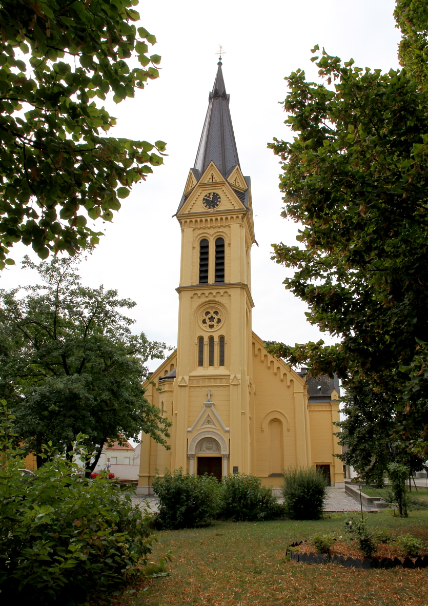 Die evangelische Pfarrkirche in der burgenländischen Gemeinde Gols.